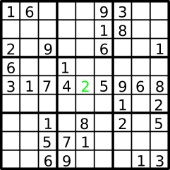 Kun en mulighed